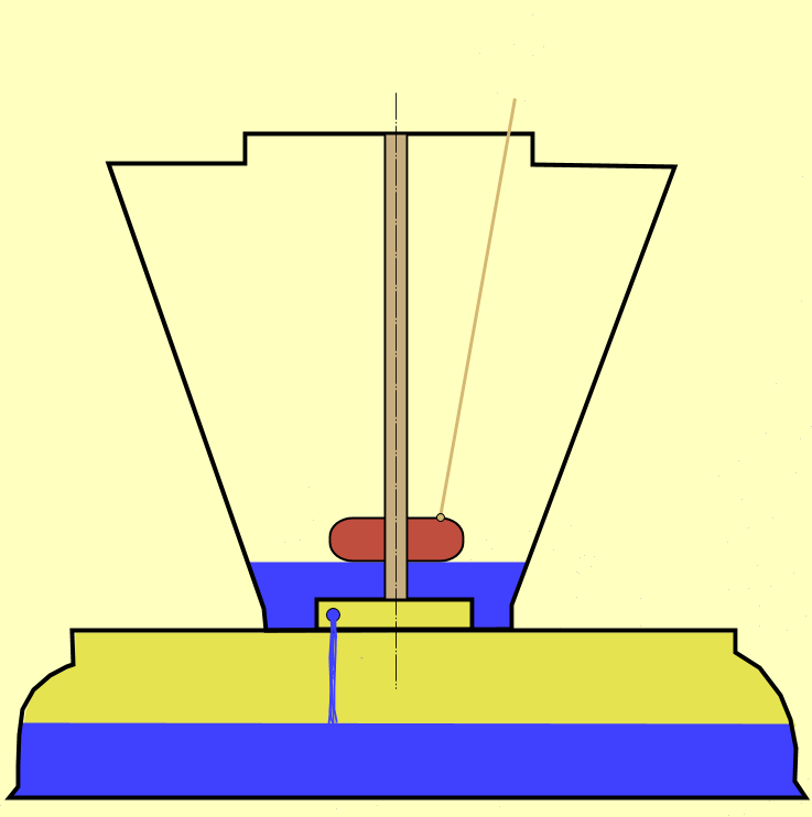 Représentation schématique du système moteur du scribe d'al-Jazari.